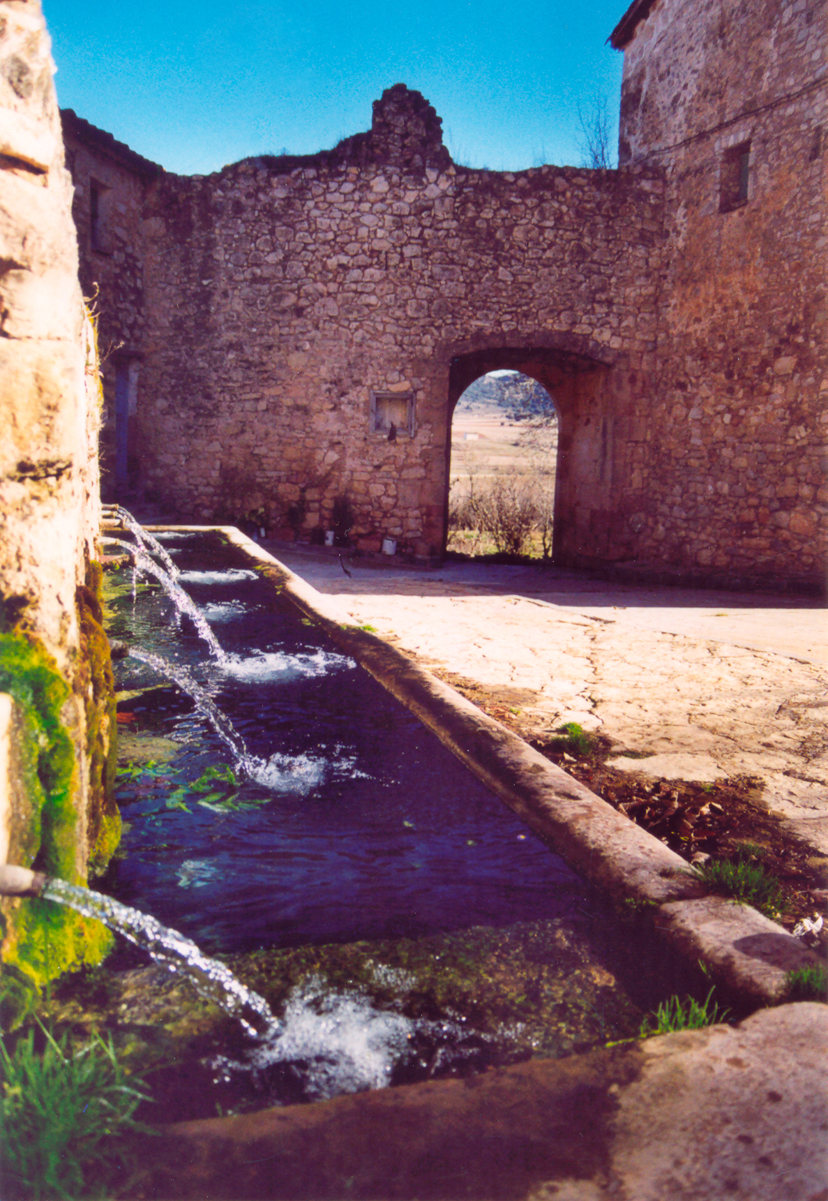 Fuente de los siete caños de la villa medieval de Palazuelos, Guadalajara.